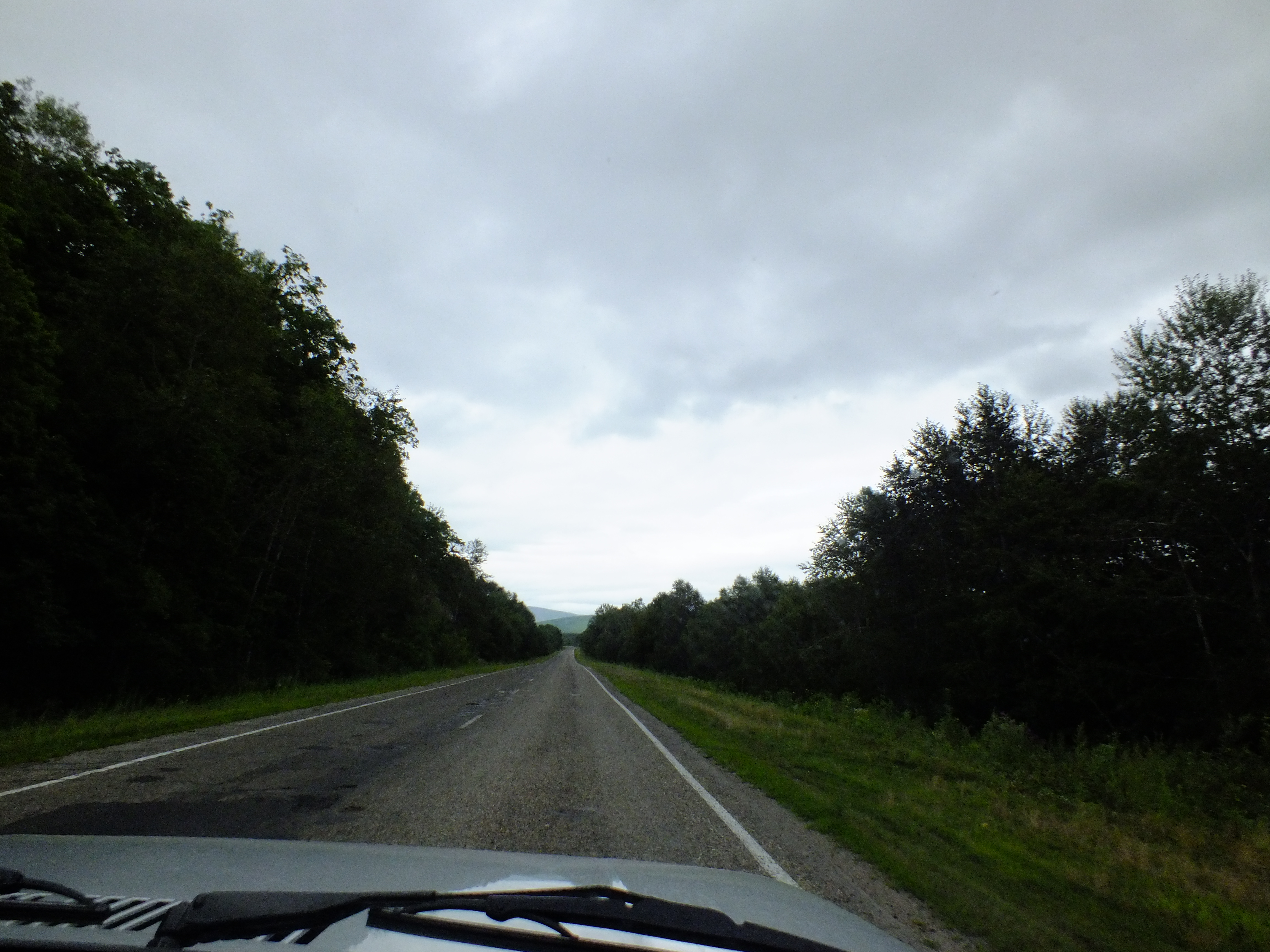 Kavalerovo, Primorsky Krai